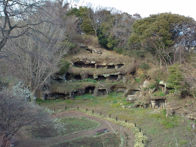 名越切通脇にあるまんだら堂やぐら群。